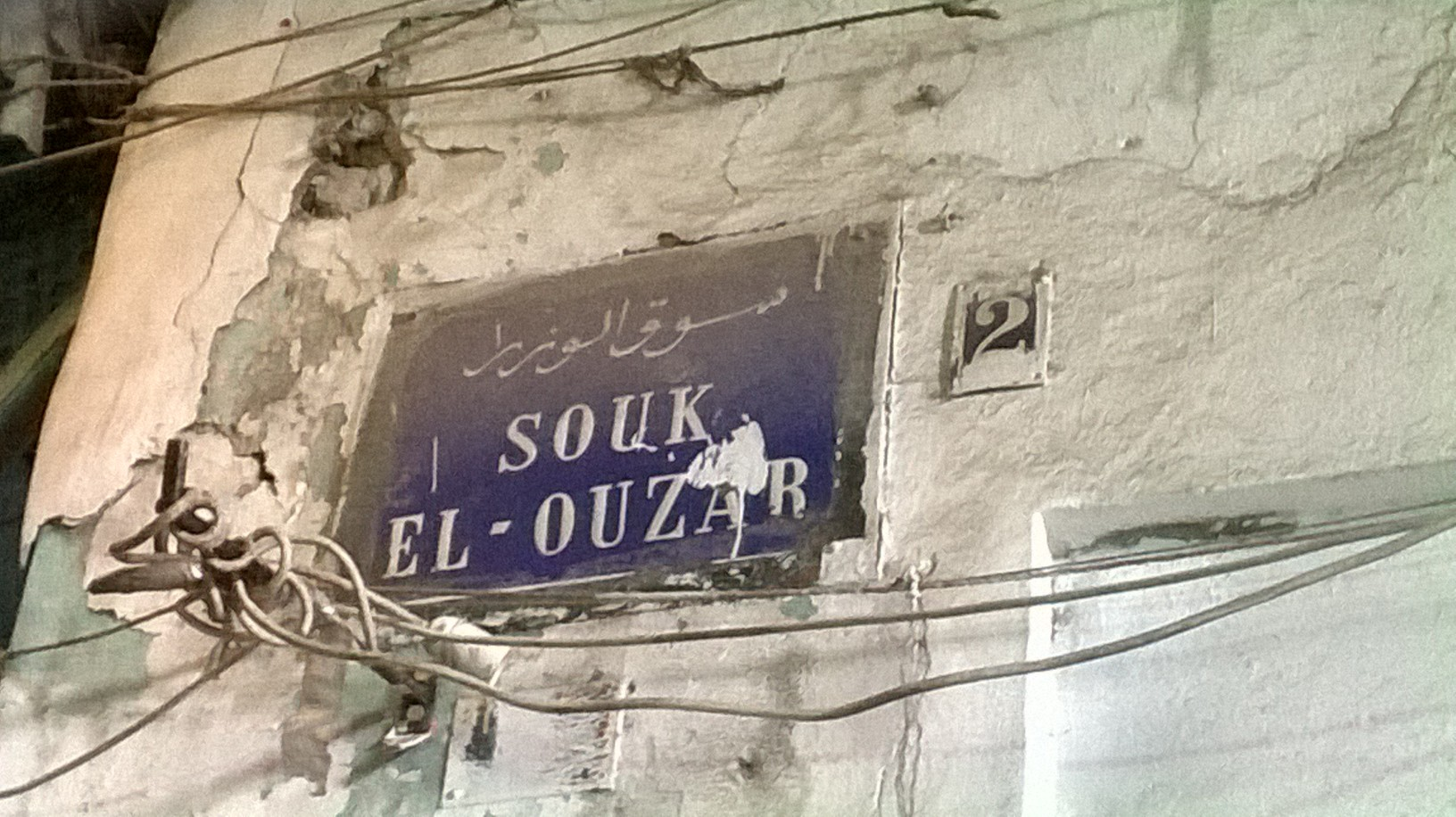 Souk ,Médina de Tunis